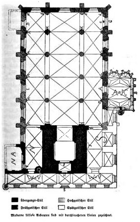 Grundriss der Kirche St. Marien Greifswald, aus Krönig, E.: Die Baugeschichte der Marien-Kirche zu Greifswald. In: Pommersche Jahrbücher 1 (1900), S. 81